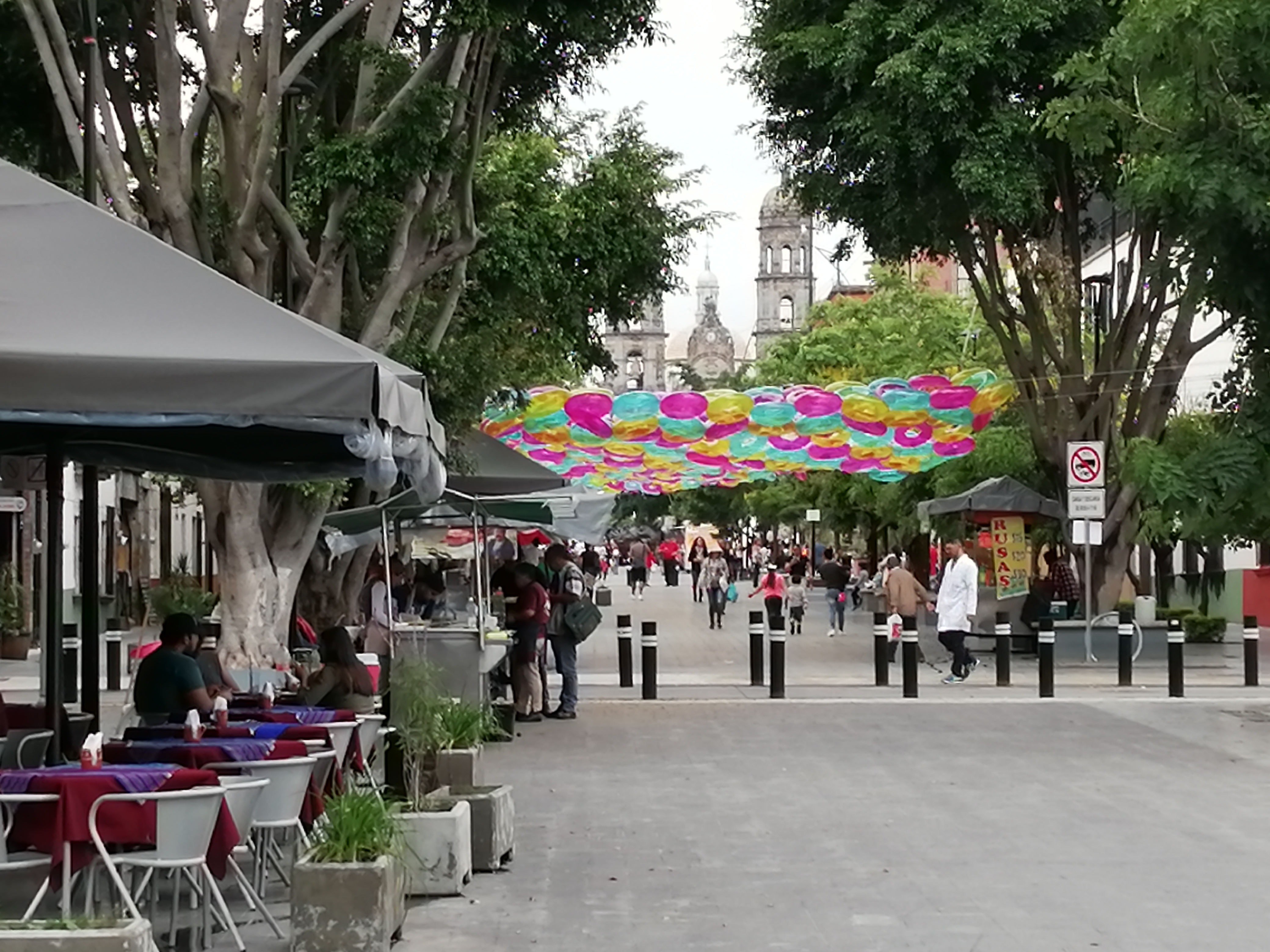 20 de noviembre de zapopan